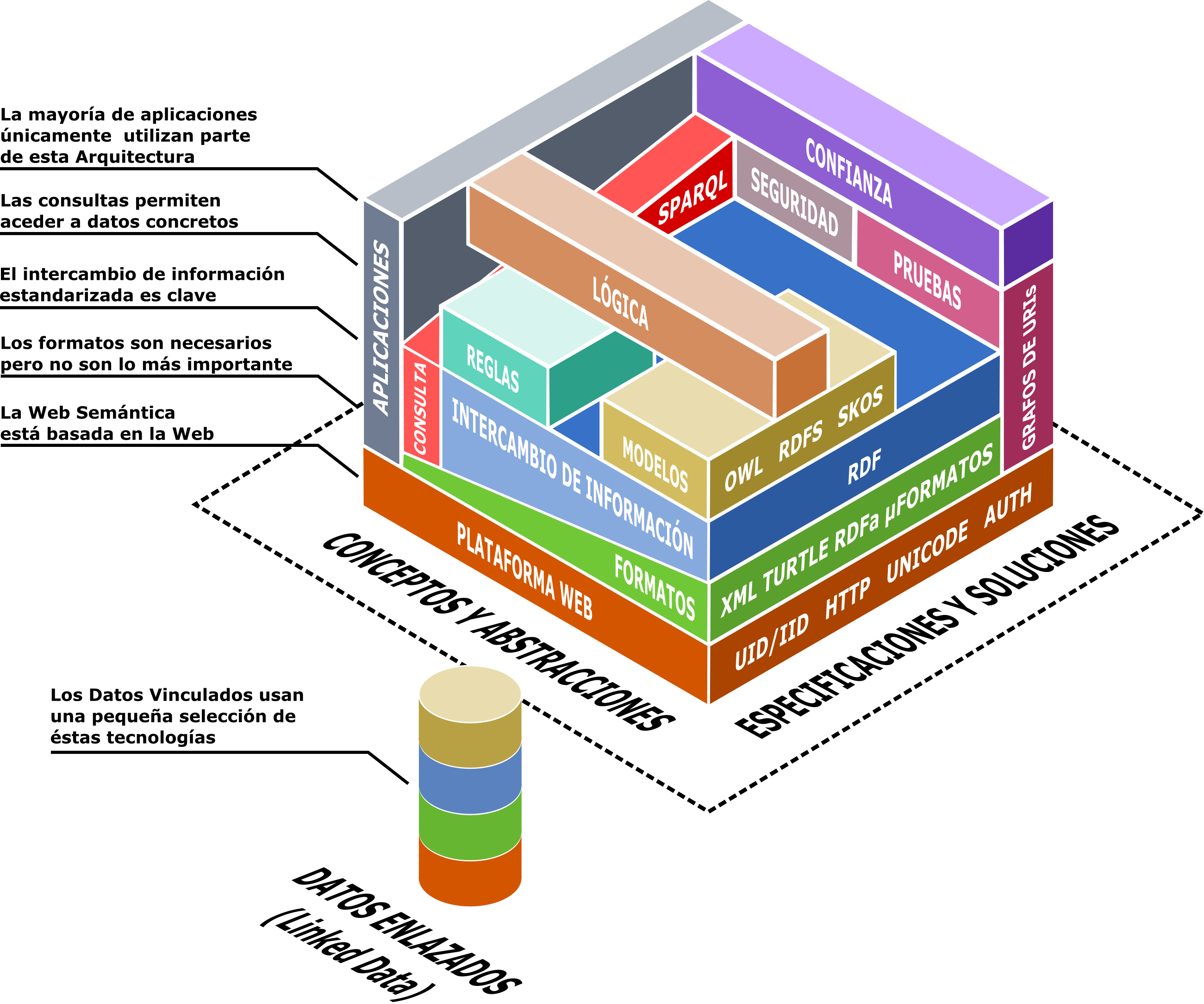 Muestra las especificaciones y niveles conceptuales de abstracción de las diferentes tecnologías de la Web Semántica